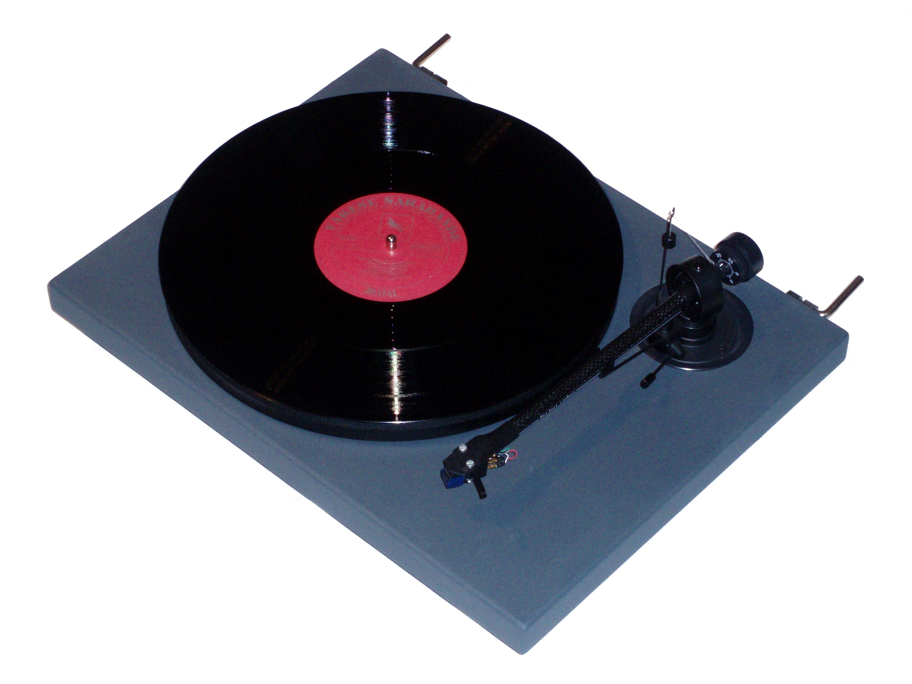 Pro-Ject Xpression turntable.